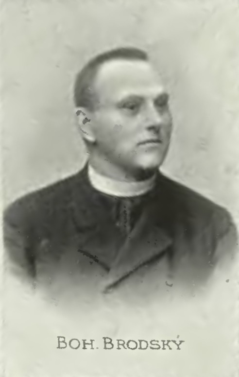 Portrét – Bohumil Zahradník-Brodský (1854-1921), Český prozaik.